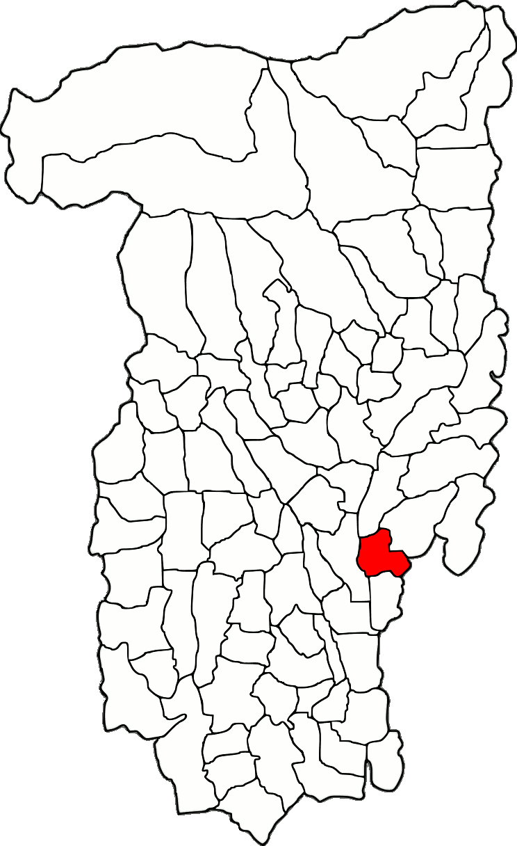 Lage der Gemeinde Olanu im Kreis Vâlcea (RO).